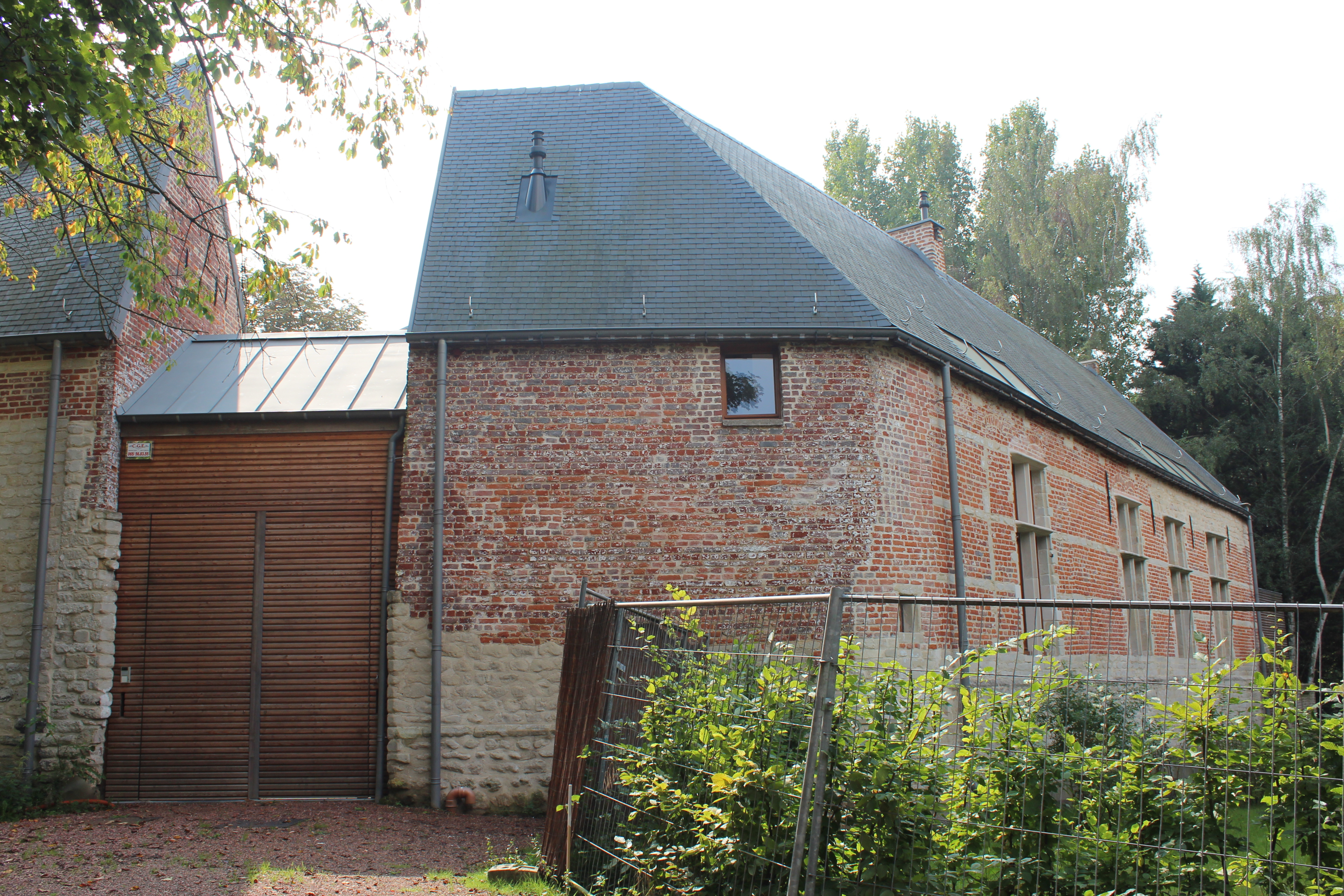 Ferme Hof ter Coigne (Typologie: Ferme) Construit (Style: Architecture traditionnelle). WATERMAEL-BOITSFORT RUE DE LA BIFURCATION 7 - 9, RUE DU BRILLANT 1. Classé comme Monument. Décision d'ouvrir la procédure de protection: 19/09/1991 Décision définitive de protection : 14/04/1994. Référence: 2328-0007/0